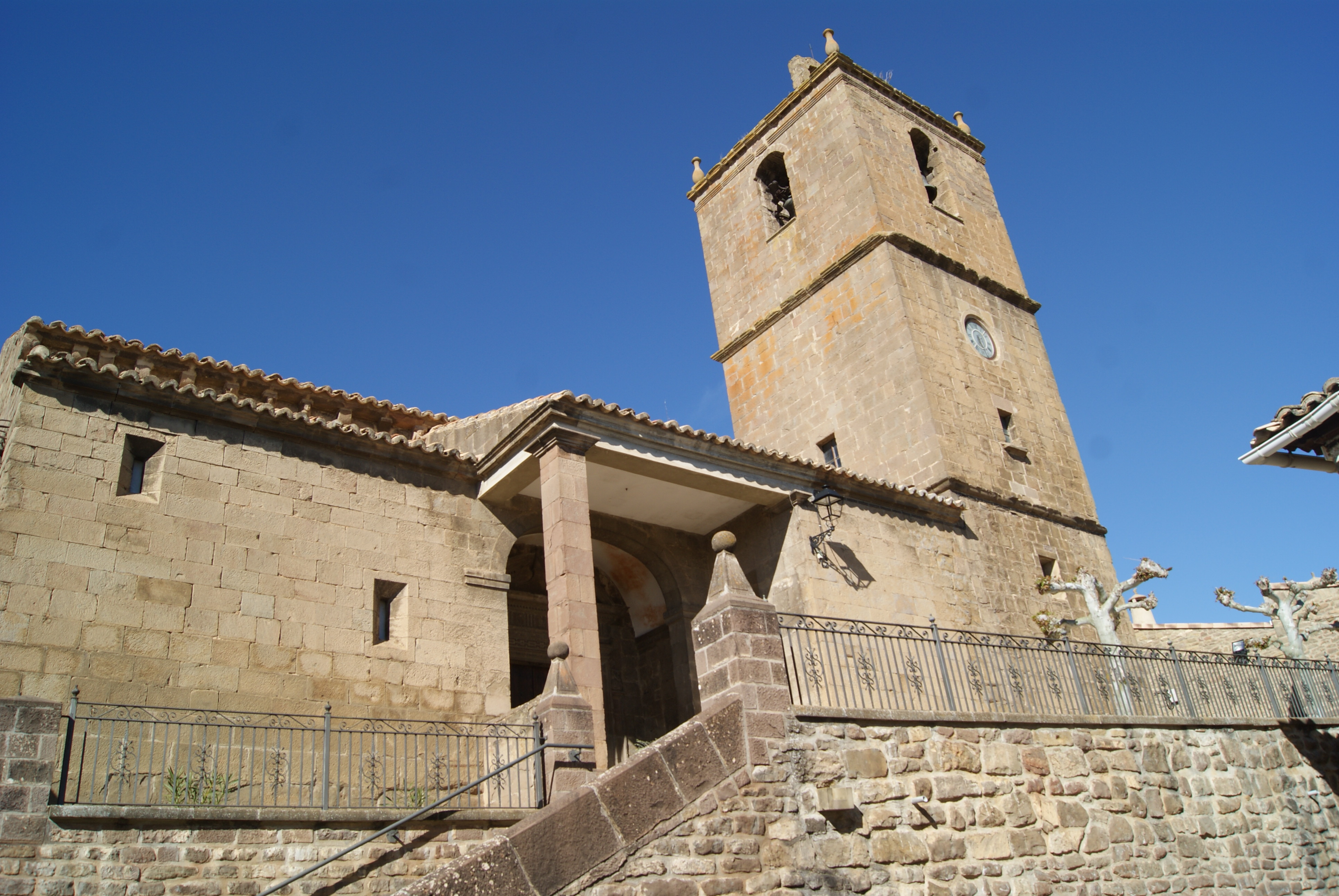 Urriés (Zaragoza) - Iglesia de San Esteban (B.I.C. - RI-51-0001441)